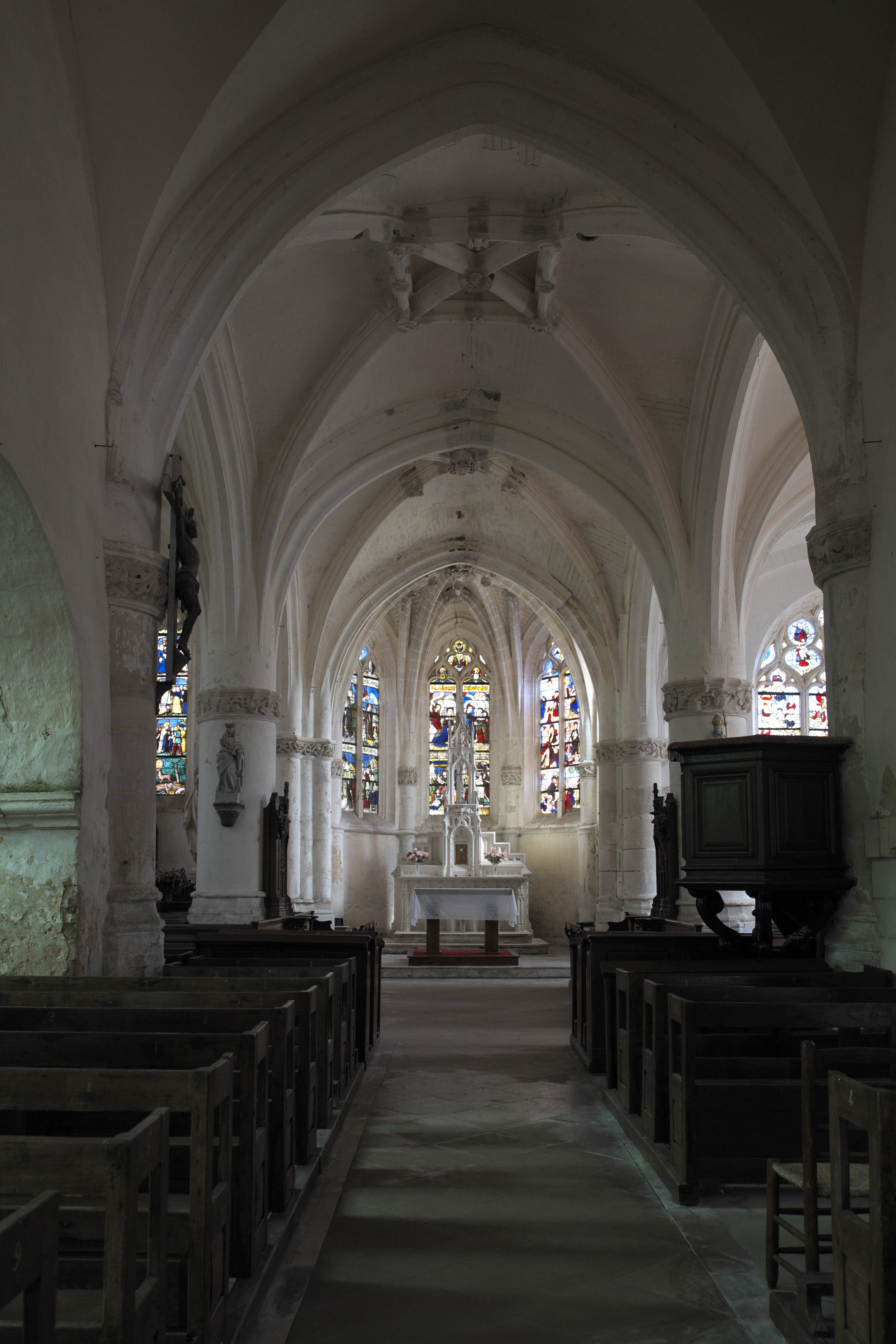 Katholische Kirche Notre-Dame-en-sa-Nativité in Puellemontier im Département Haute-Marne (Champagne-Ardenne/Frankreich), Innenraum .